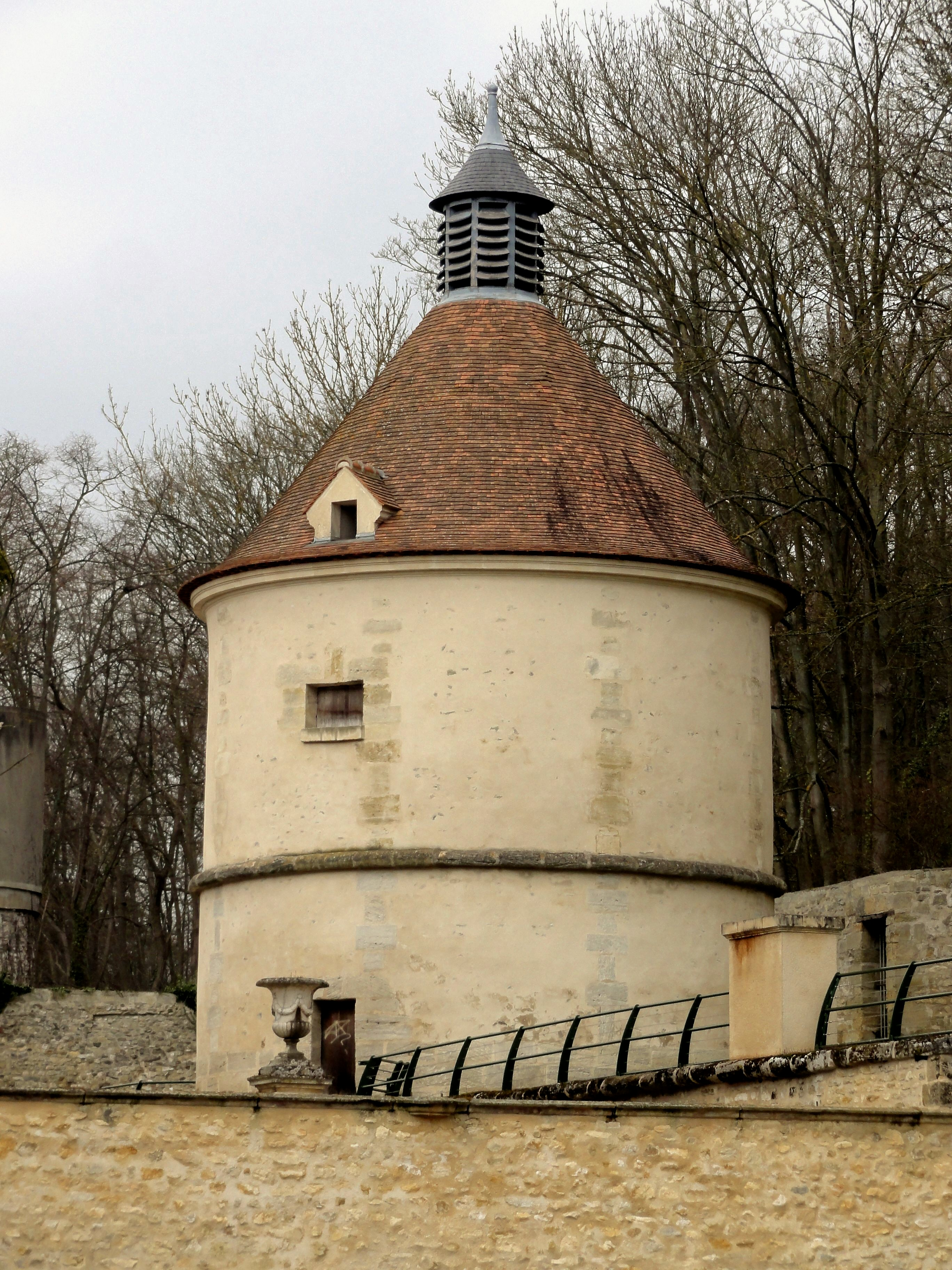 Le colombier au nord du château.